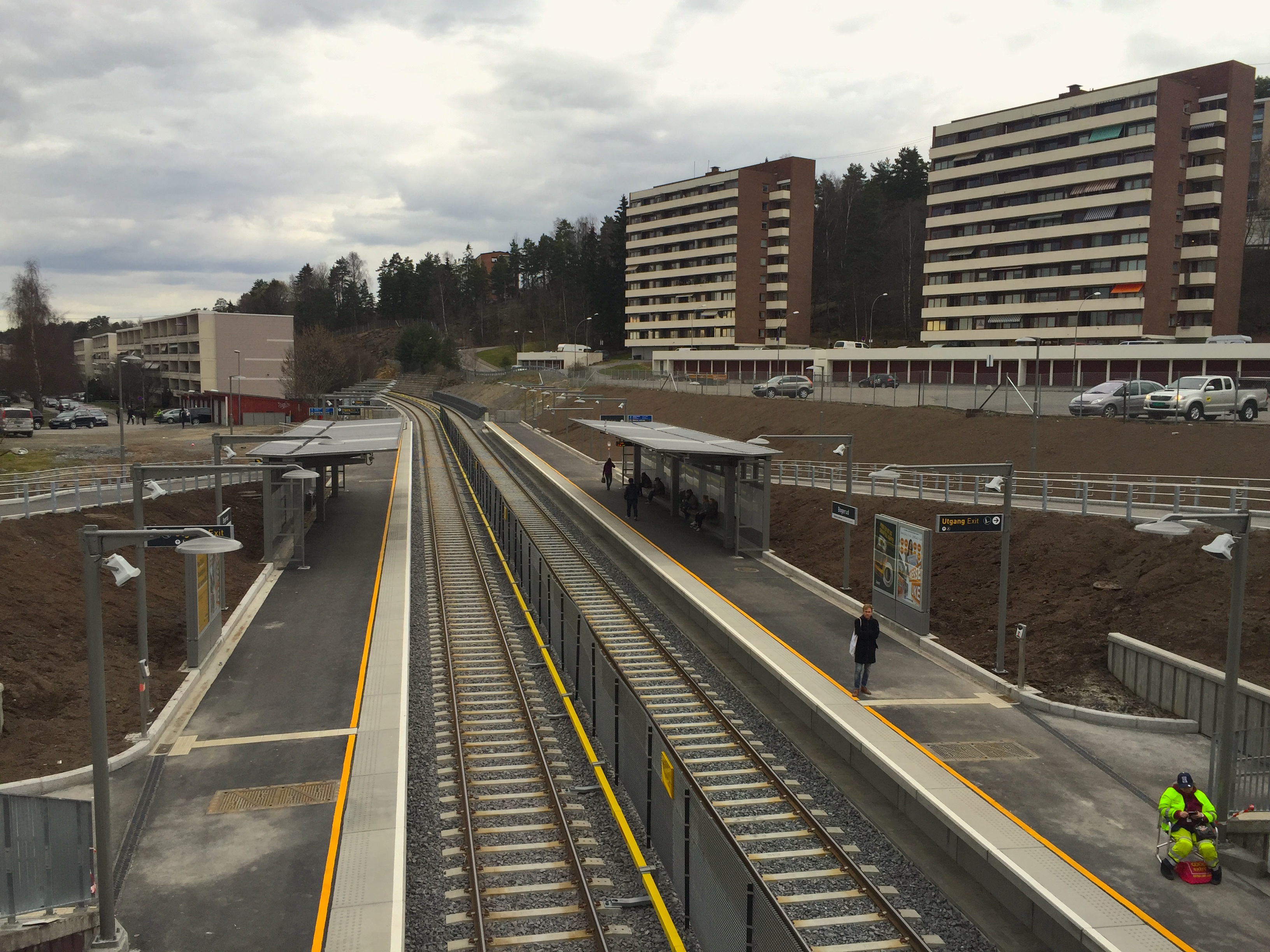 Bogerud t-banestasjon i Oslo.